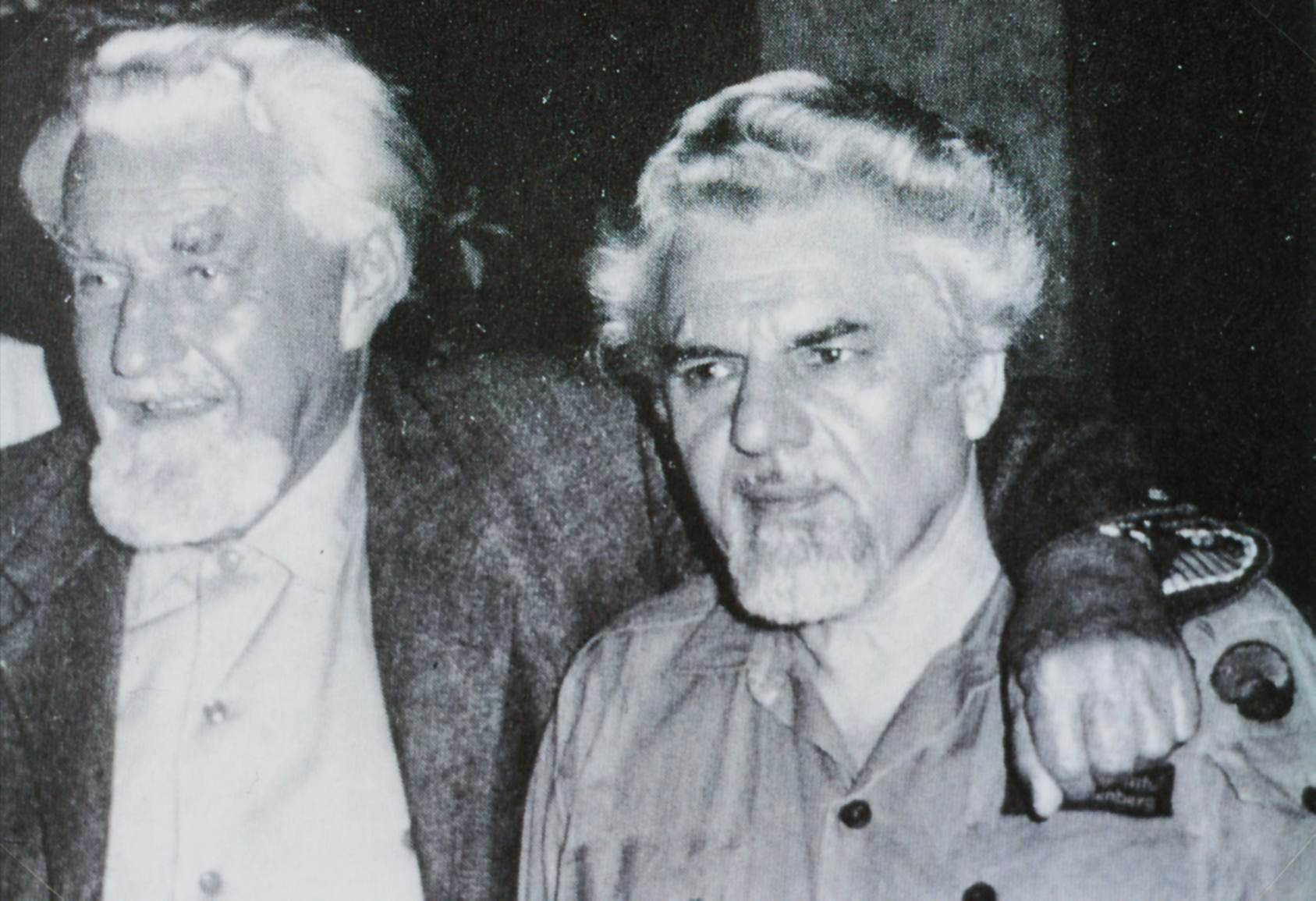 Der Verhaltensforscher Otto Koenig (rechts) mit seinem Lehrer und Vorbild Konrad Lorenz (links). Aufgenommen 1974 in Winden, Burgenland, Österreich.